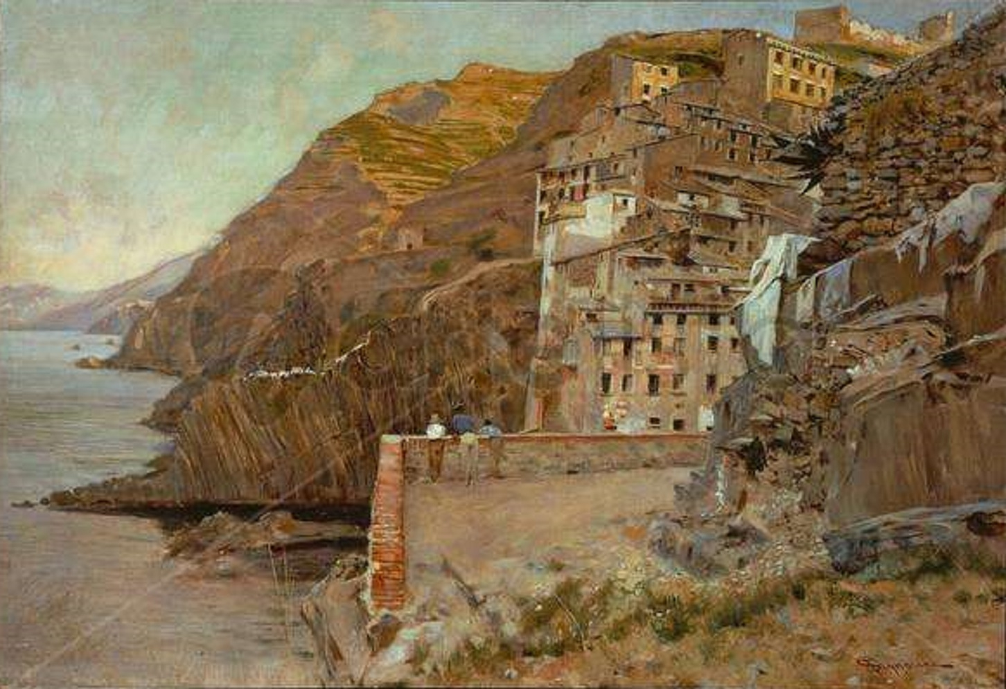 Veduta del paese di Riomaggiore